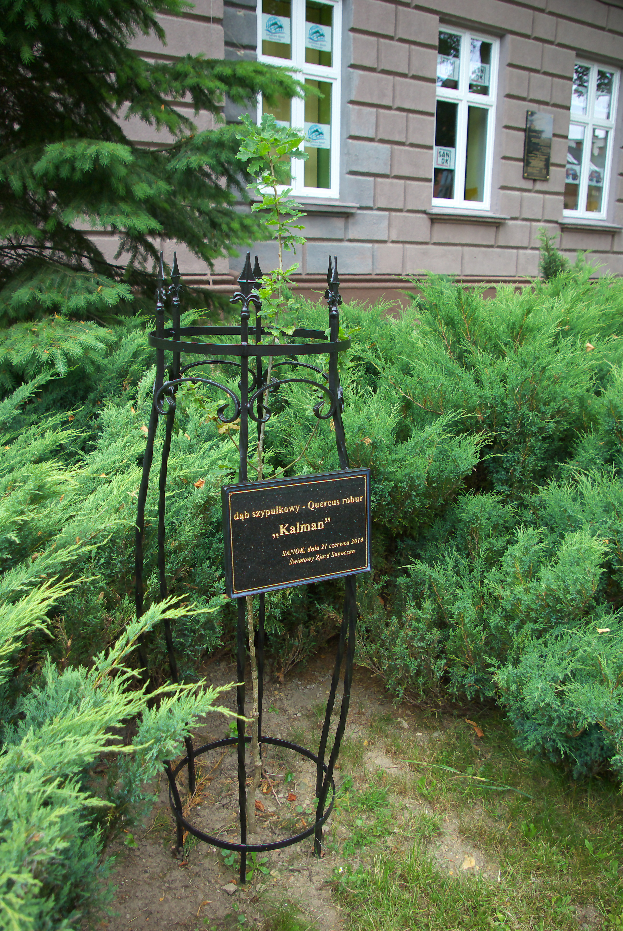 Dąb szypułkowy "Kalman" honorujący absolwenta gimnazjum, którym był literat Kalman Segal. Zasadzony przy Gimnazjum nr 2 im. Królowej Zofii w Sanoku 21 czerwca 2014